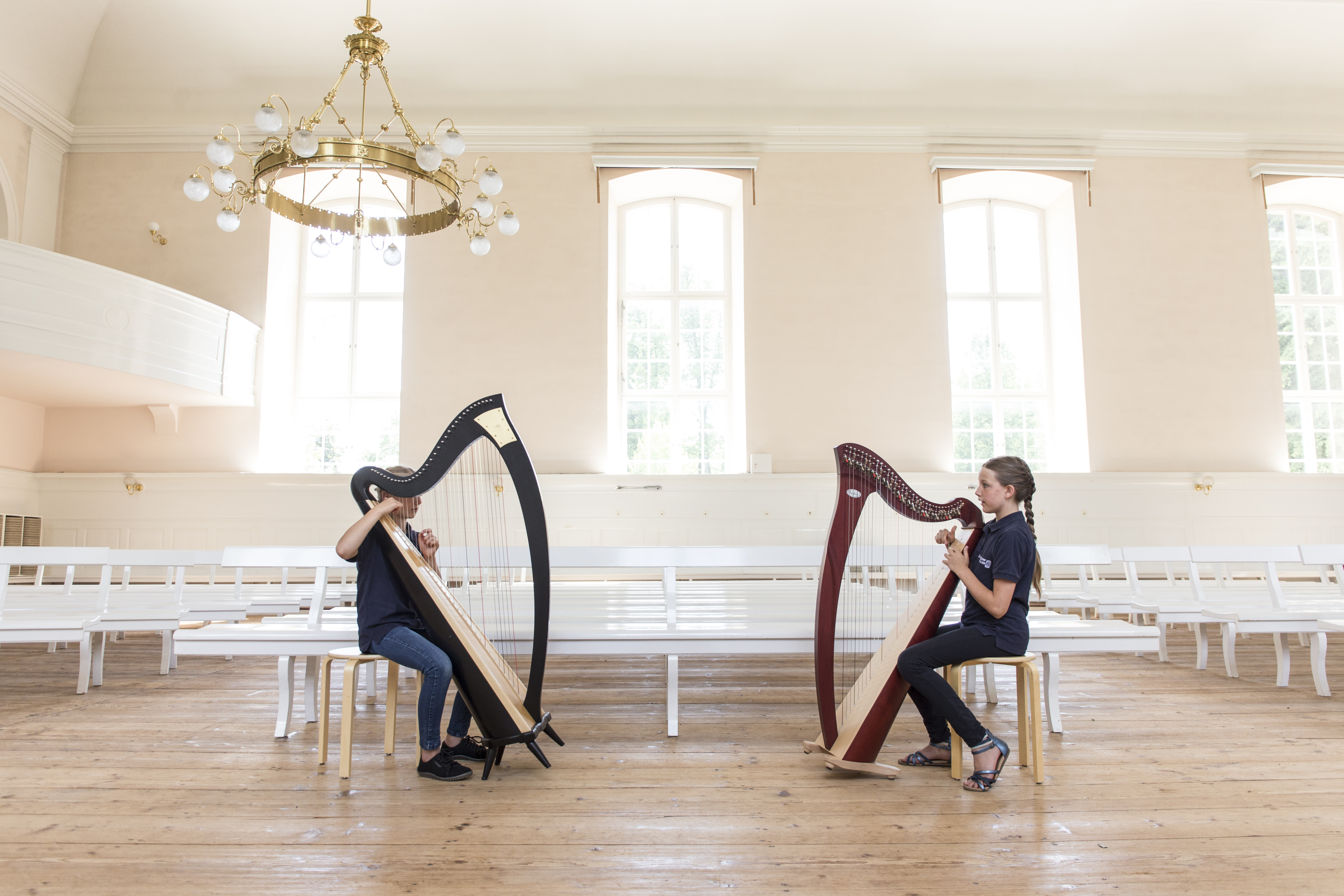 Harfen im Kirchensaal